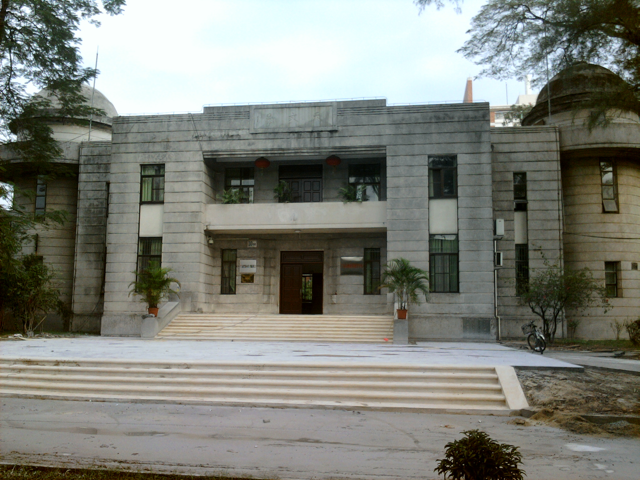 國立中山大學天文臺，現位於華南農業大學內。